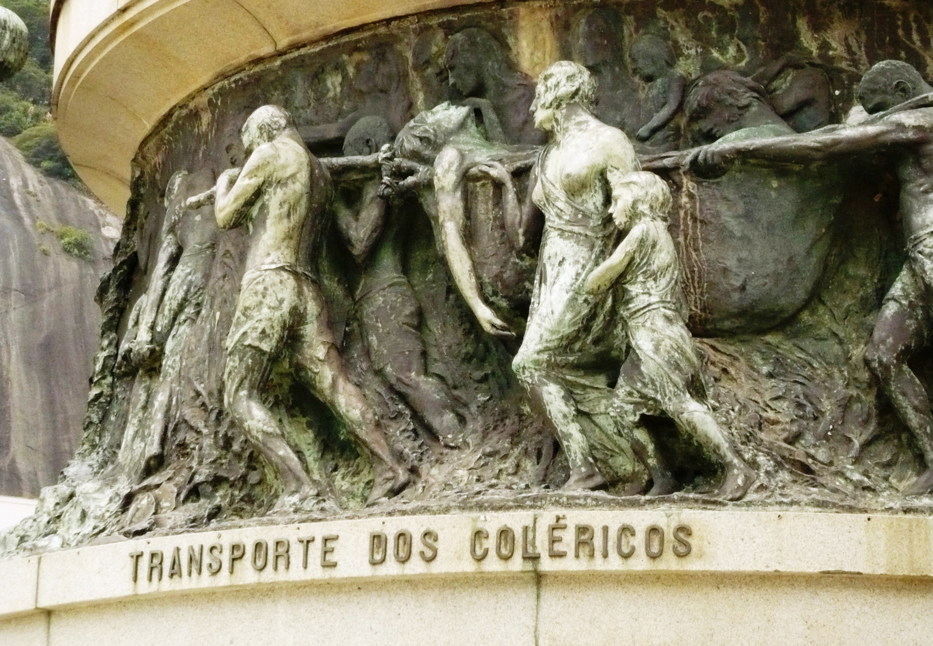 Monumento aos Heróis de Laguna e Dourados, Urca, Rio de Janeiro, RJ, Brasil: detalhe do transporte dos coléricos.